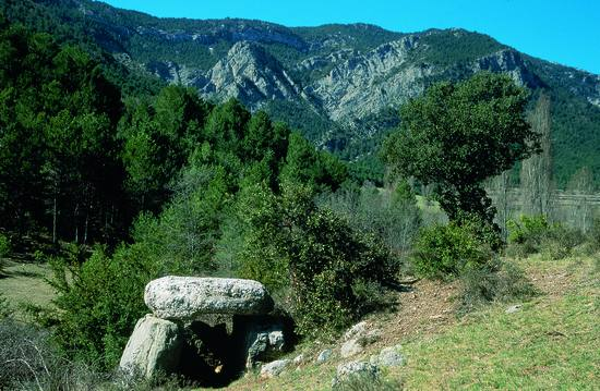 Dolmen de l'edat del bronze